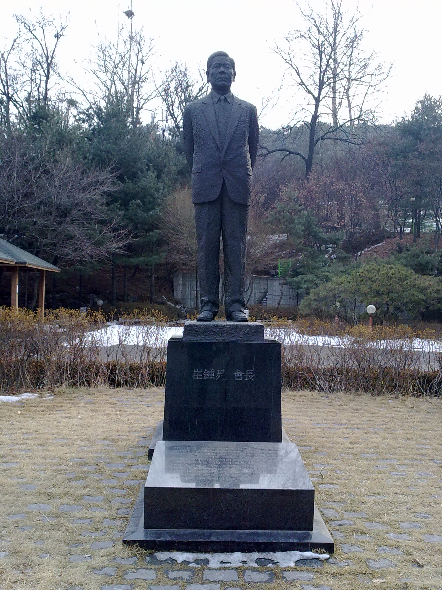 선경도서관에 있는 최종건(SK그룹 前 회장)의 동상